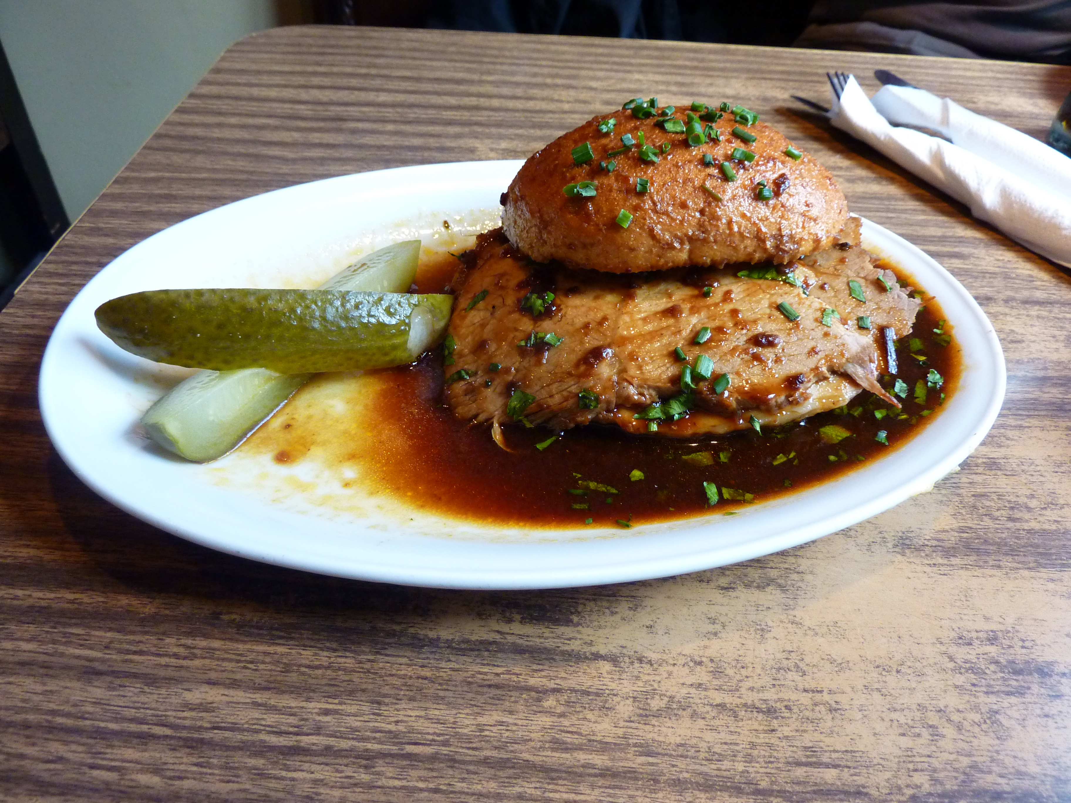 Oberhafenkantine (Hamburger_Rundstück)